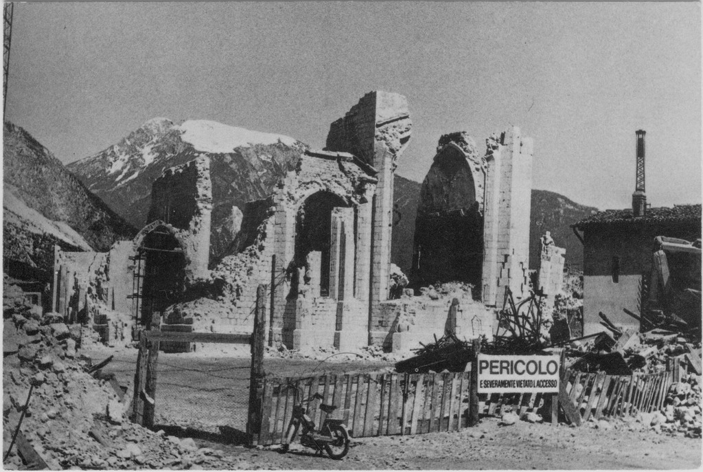 Terremoto del Friuli 1976 - Venzone Duomo dopo 15 settembre 1976 scan da foto personale